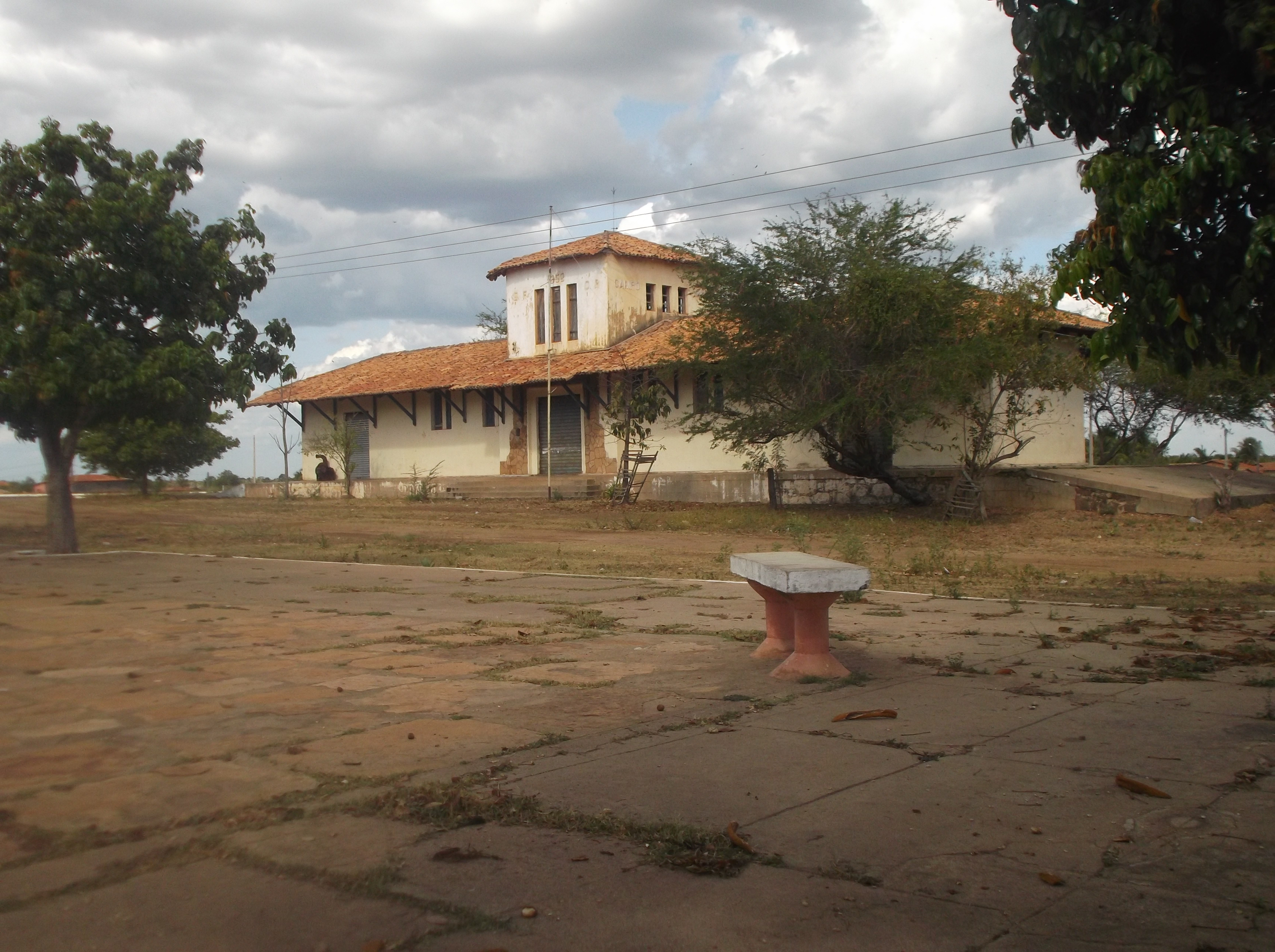 Vista da Estação Ferroviária de Campo Maior-Piauí.